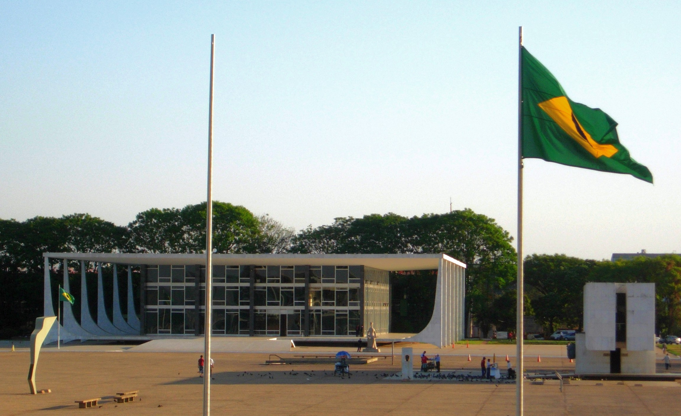 Supremo Tribunal Federal (STF) visto do Palácio do Planalto, Brasília, Brasil